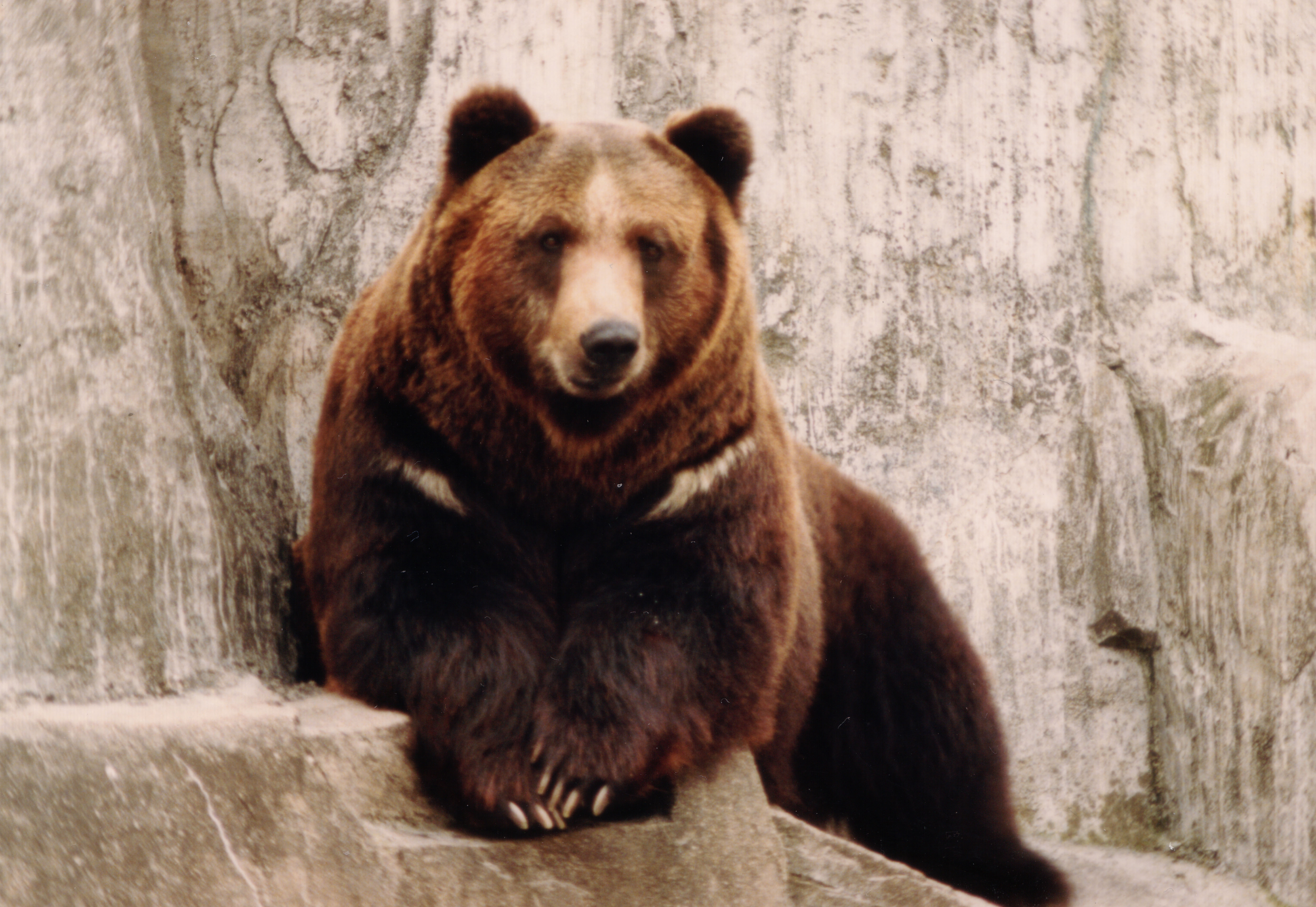 大阪天王寺動物園にて撮影